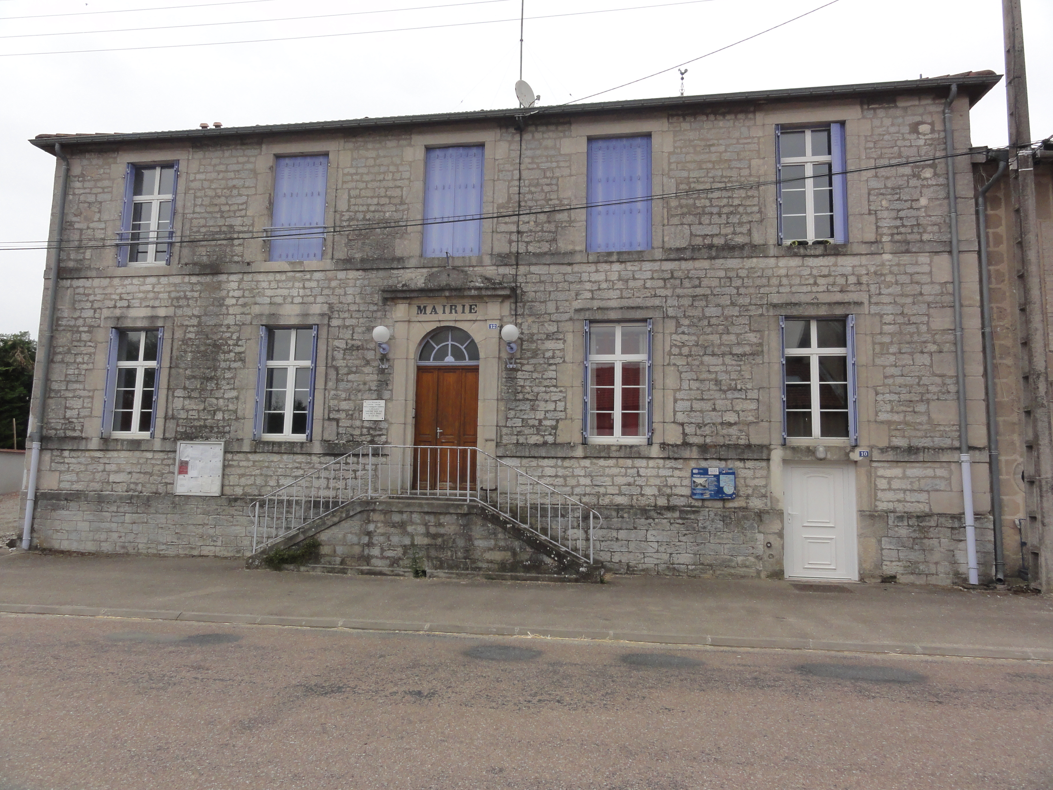 Ville-sur-Cousances (Meuse) mairie